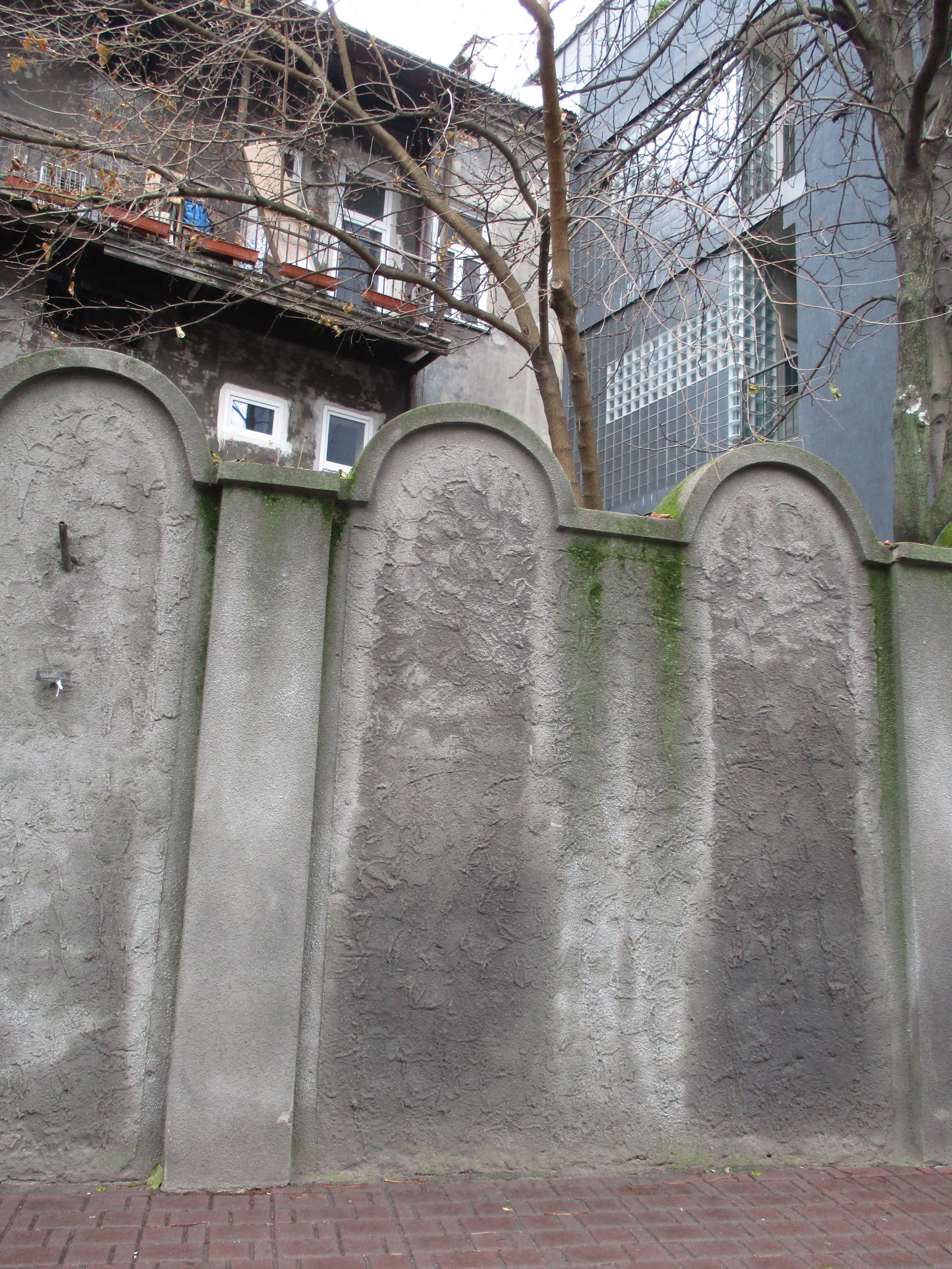 חומת גטו קרקוב (5).jpg